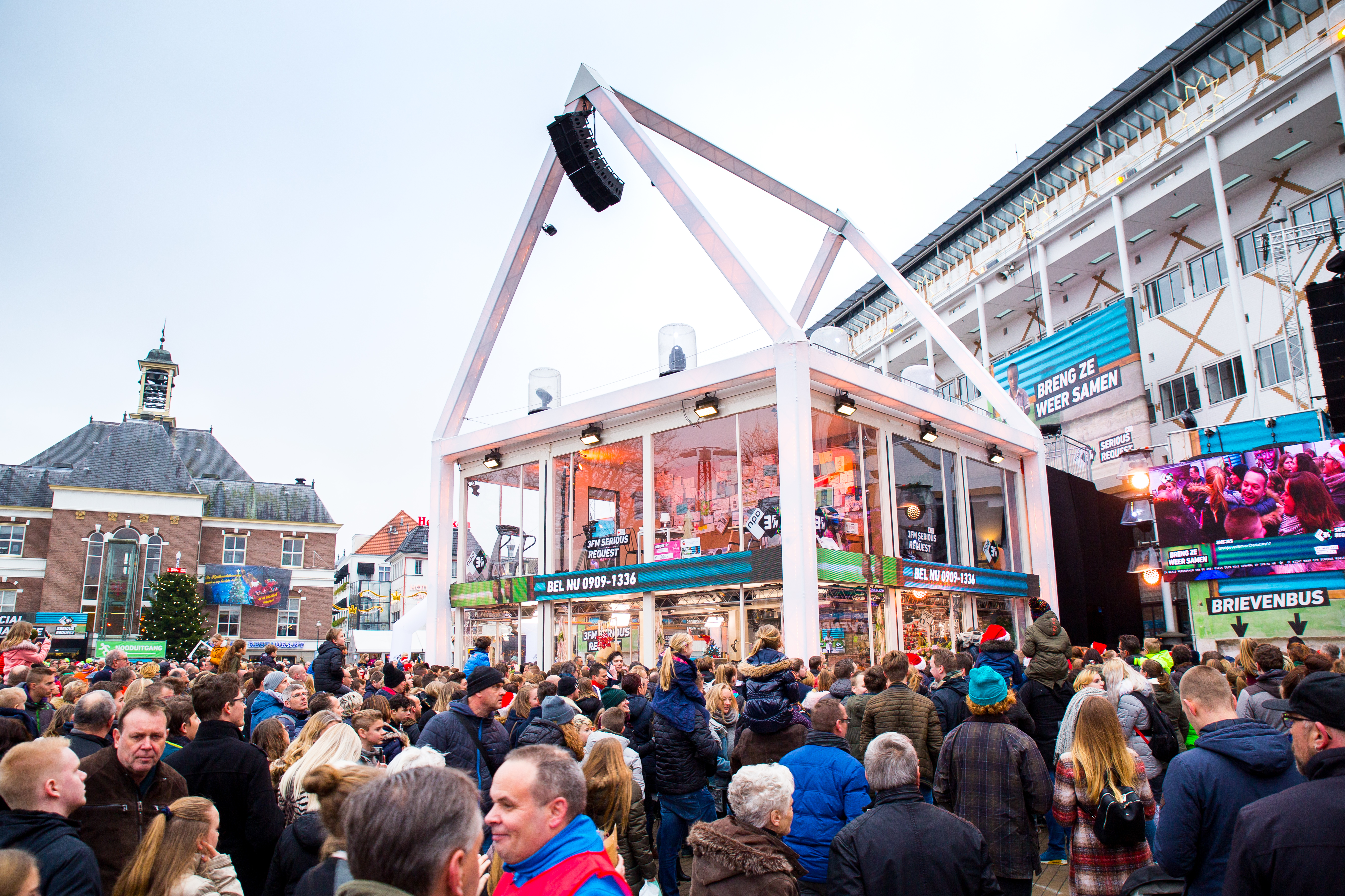 Glazen huis van NPO 3FM tijdens Serious Request 2017